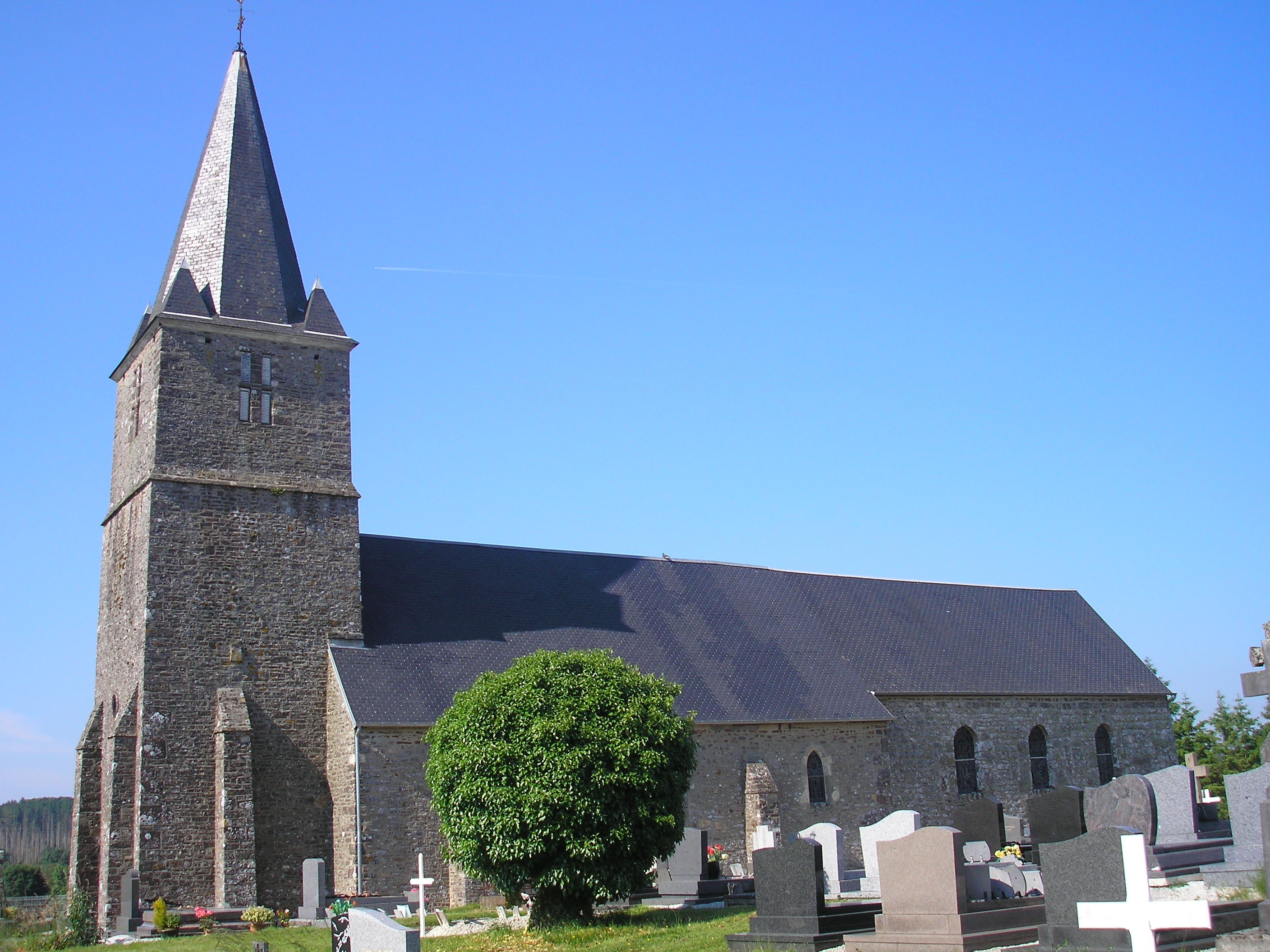 Placy-Montaigu (Normandie, France). L'église Saint-Nicolas.